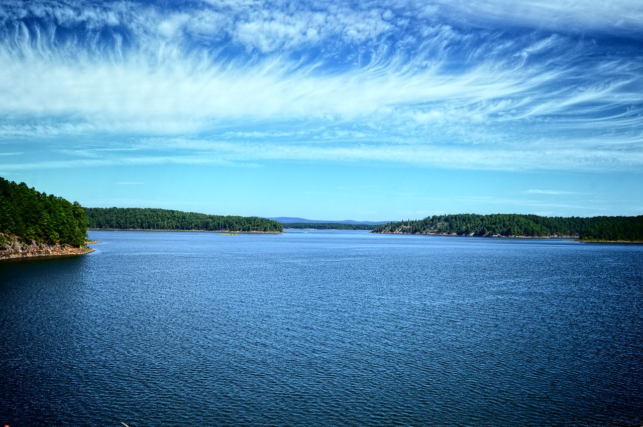 DeGray Lake, Arkansas.